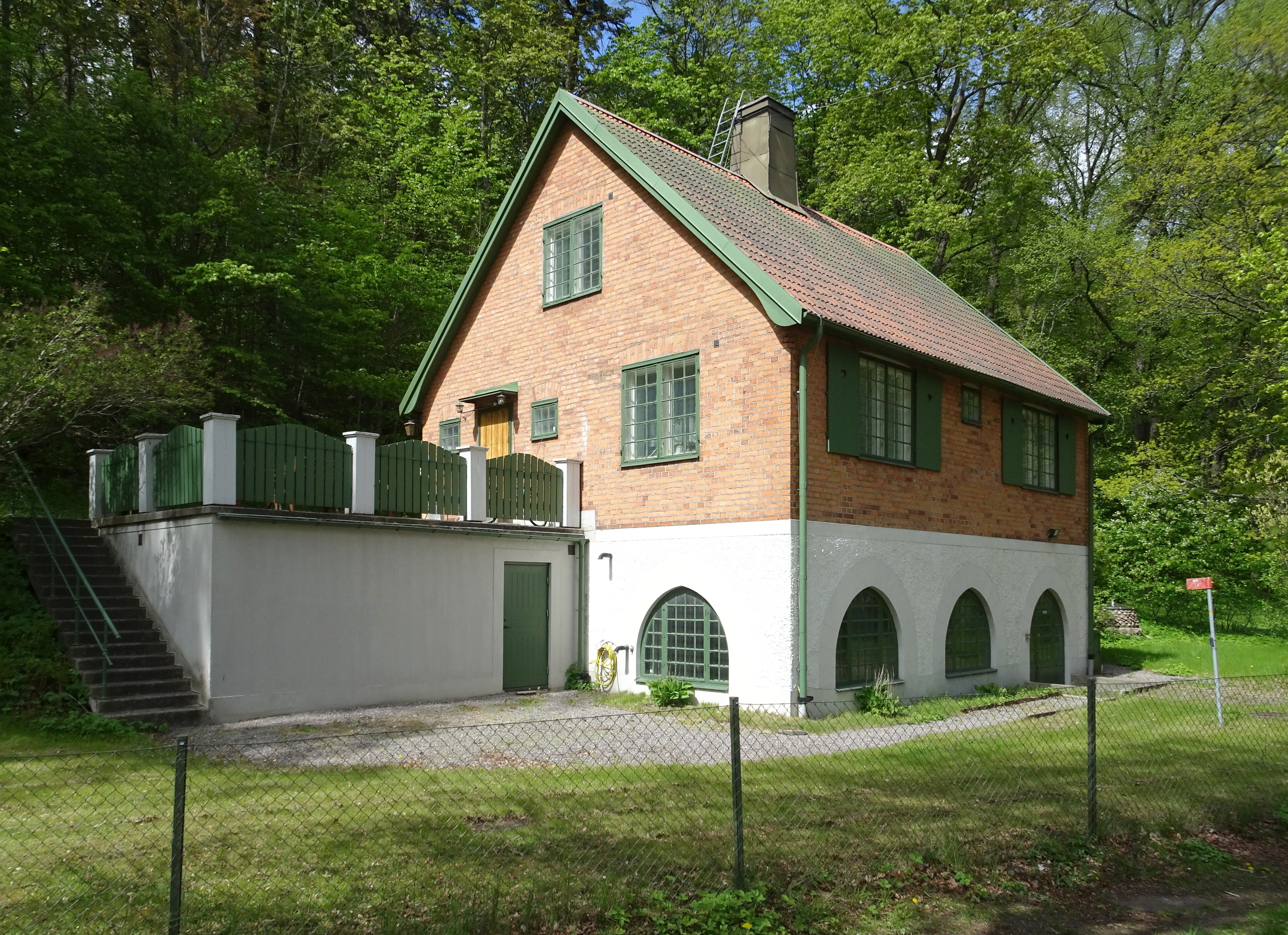 Pumphuset på Ulriksdals slottsområde, pumpade vatten till Stocksunds vattentorn